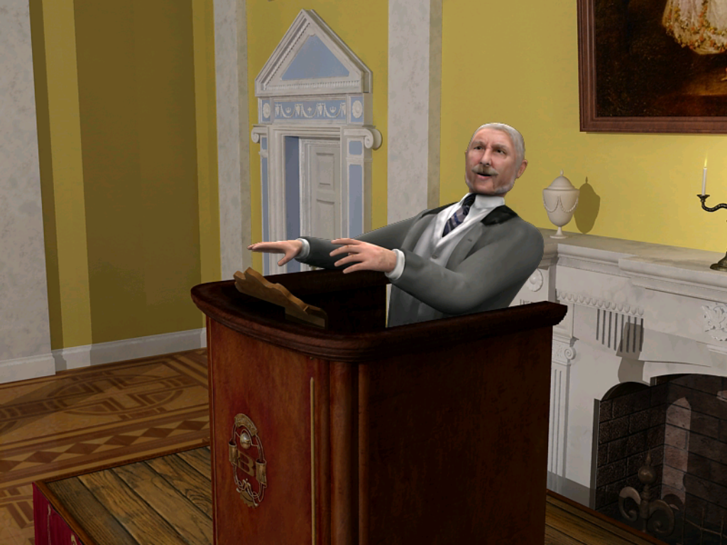 Capture d'écran du jeu Sherlock Holmes : La Boucle d'argent. On y voit Sir Bromsby au moment où celui-ci reçoit une balle lors de son discours à Sherringford Hall.